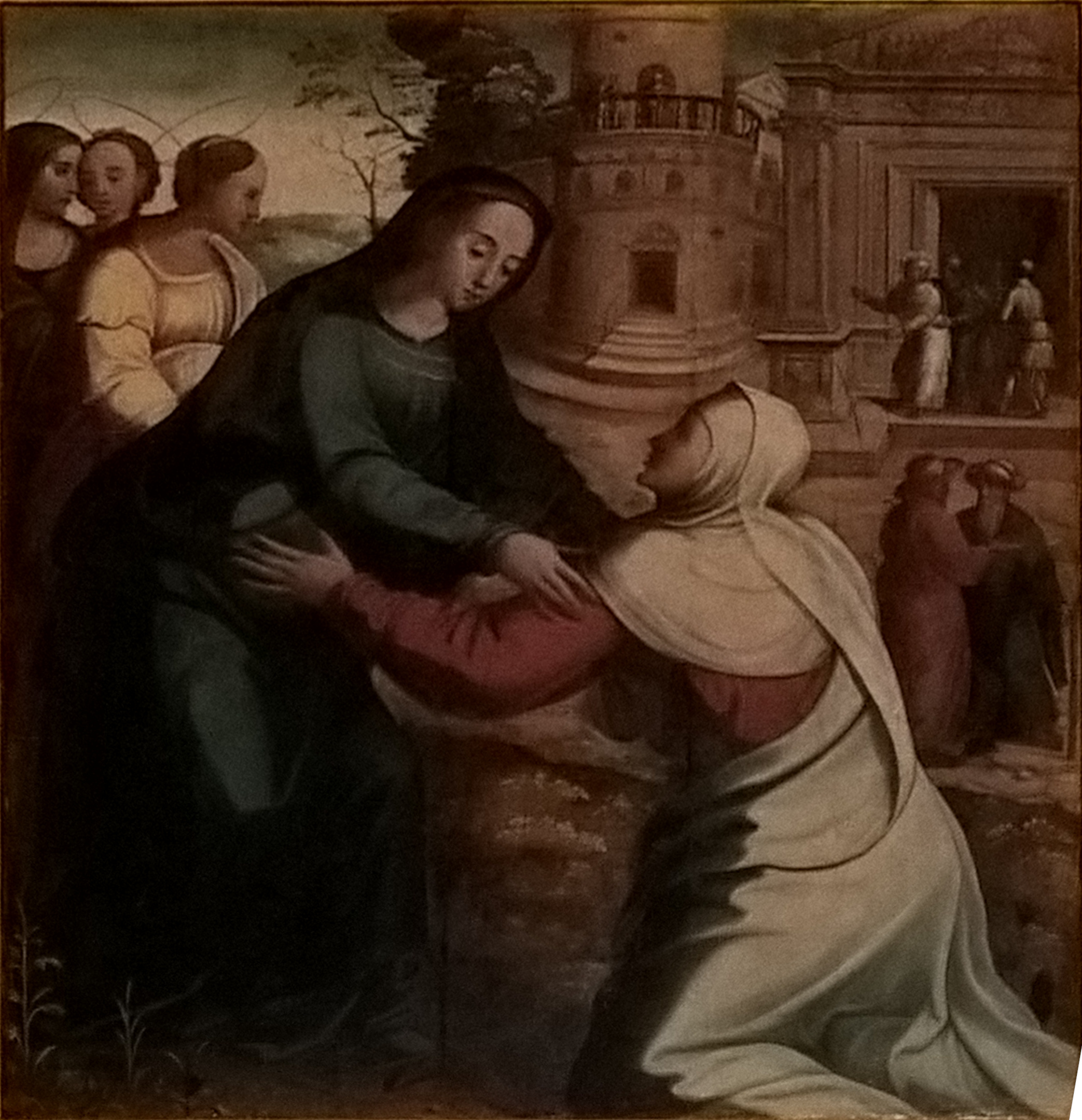 Pintura "Visitação" do Mestre de Arruda dos Vinhos, integrante do Políptico quinhentista da Matriz de Arruda dos Vinhos, de cerca de 1550